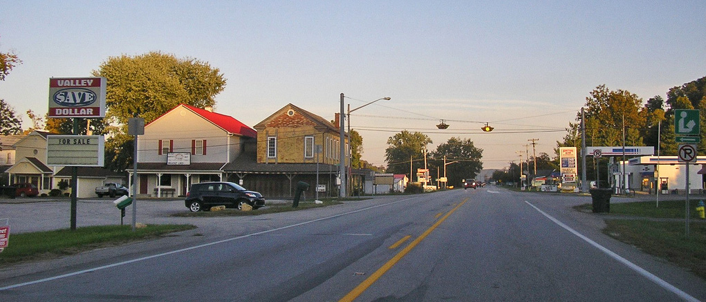 Borden, Indiana